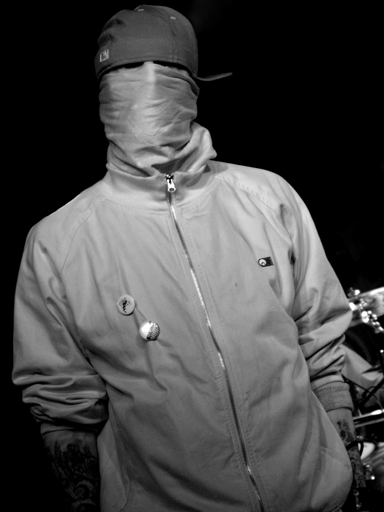 Jahred Shane von (hed)p.e.